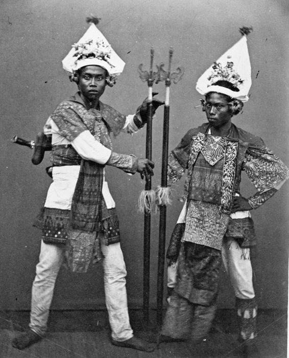 Foto. Ceremoniemeesters uit Lombok in dienst van de vorst van Bali.